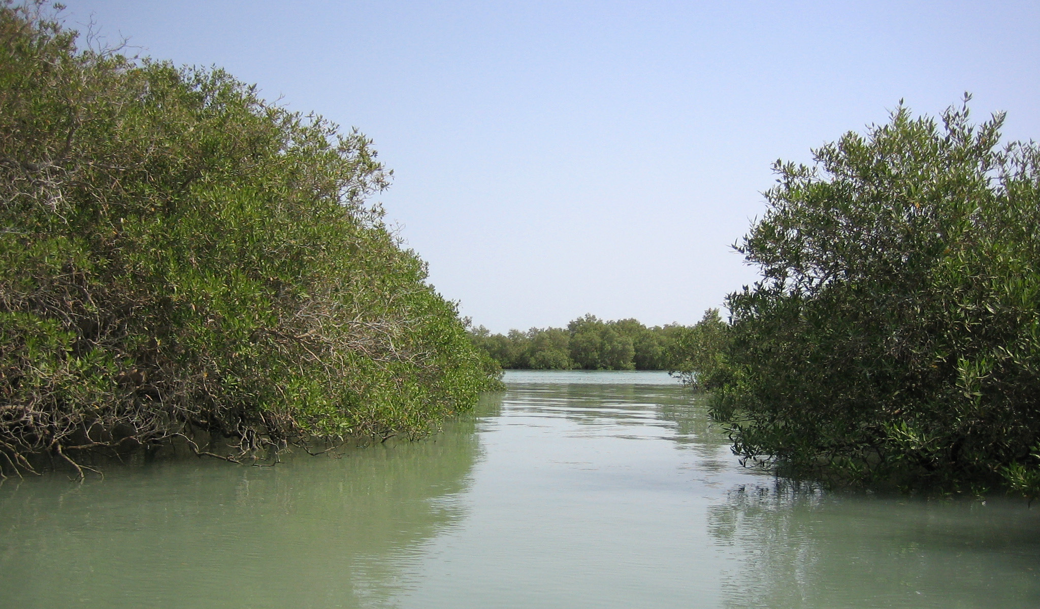 جنگل حرا